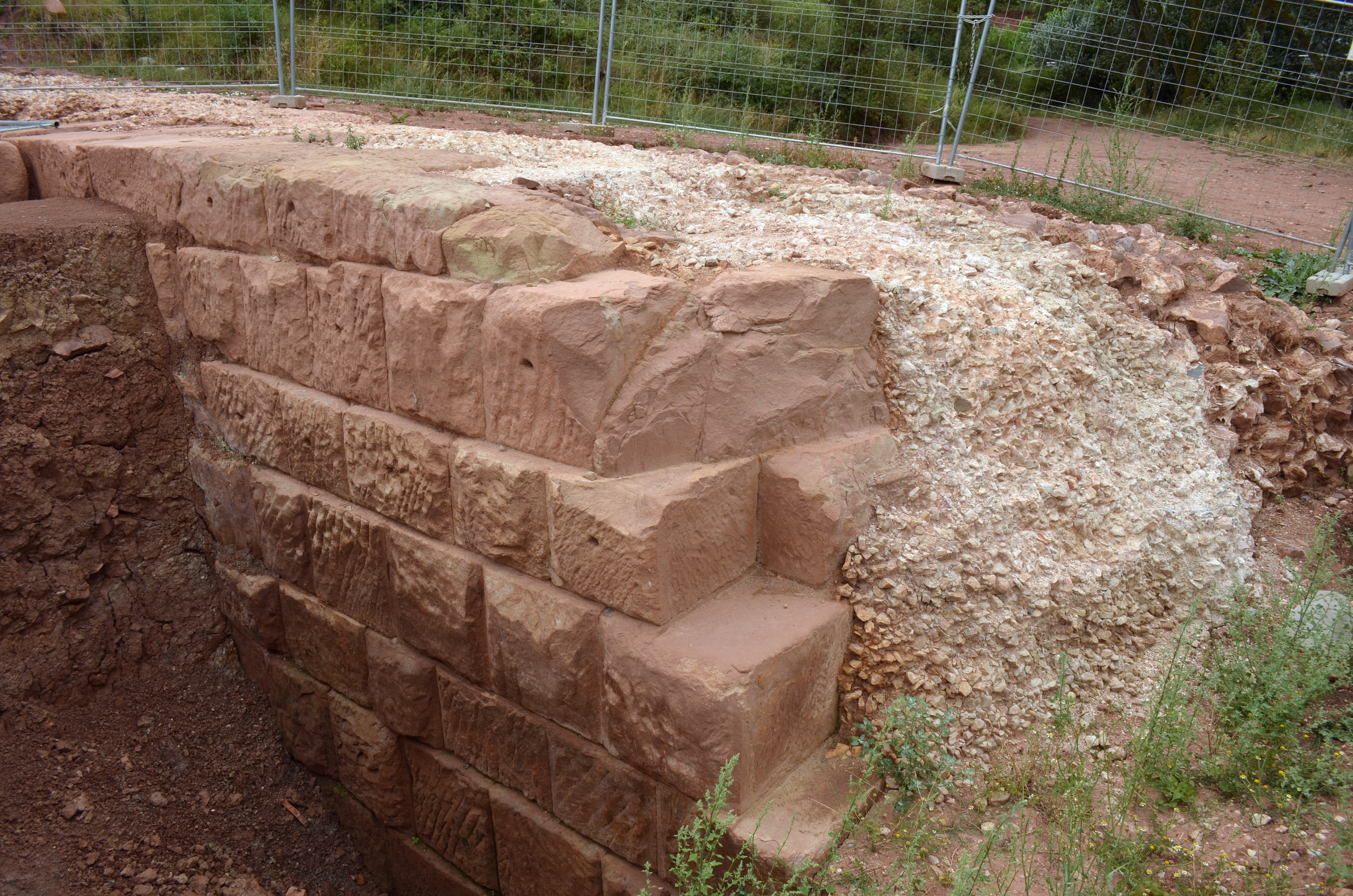 Paño de la presa romana de Mues, en Navarra, con los sillares escuadrados y tras ellos el opus caementicium.